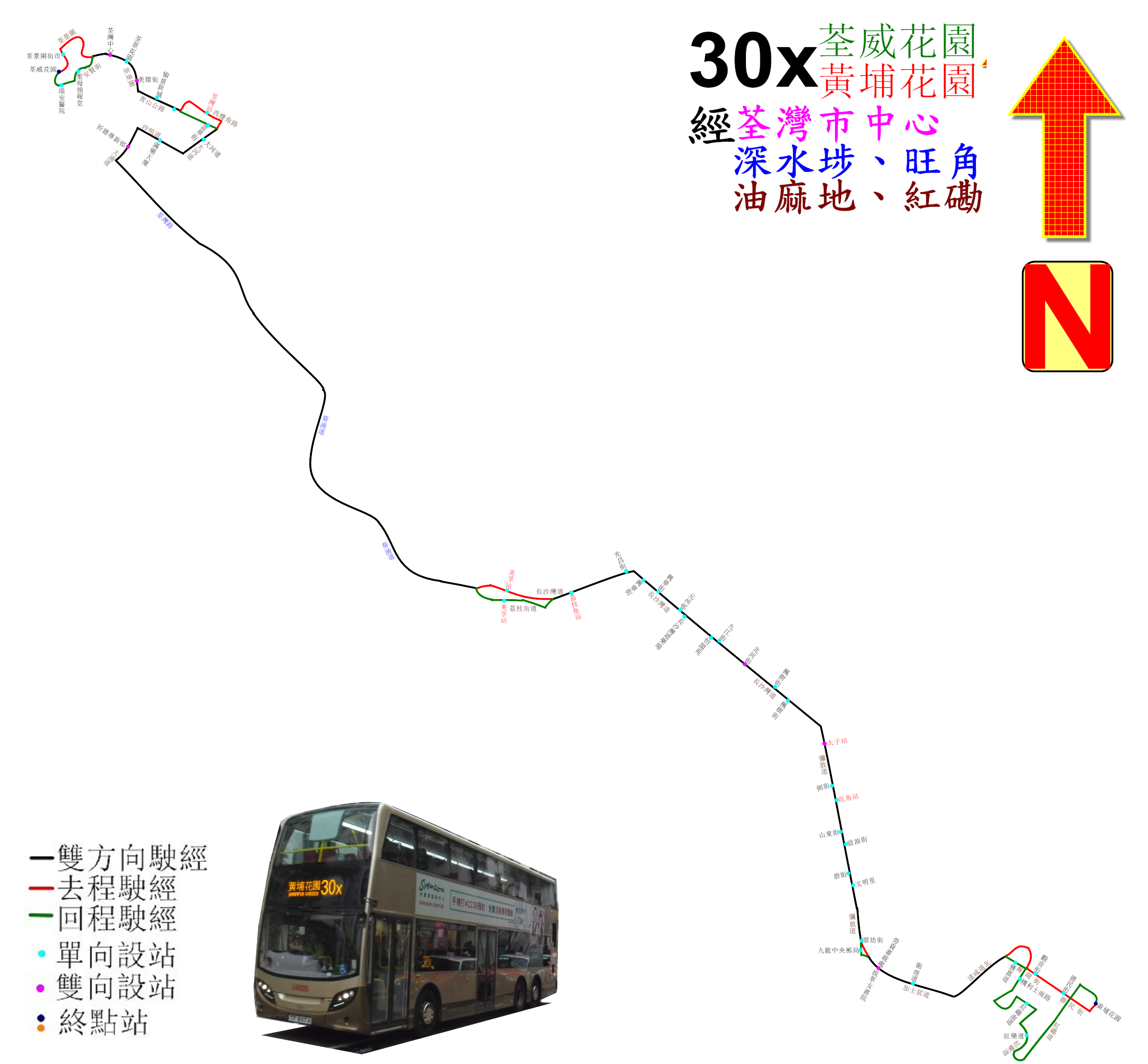 中文（香港）: 九巴30X線的走線圖